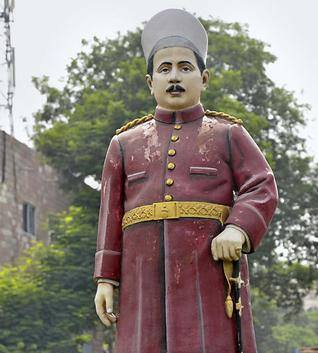 రాజా బహదూర్ వెంకటరామిరెడ్డి